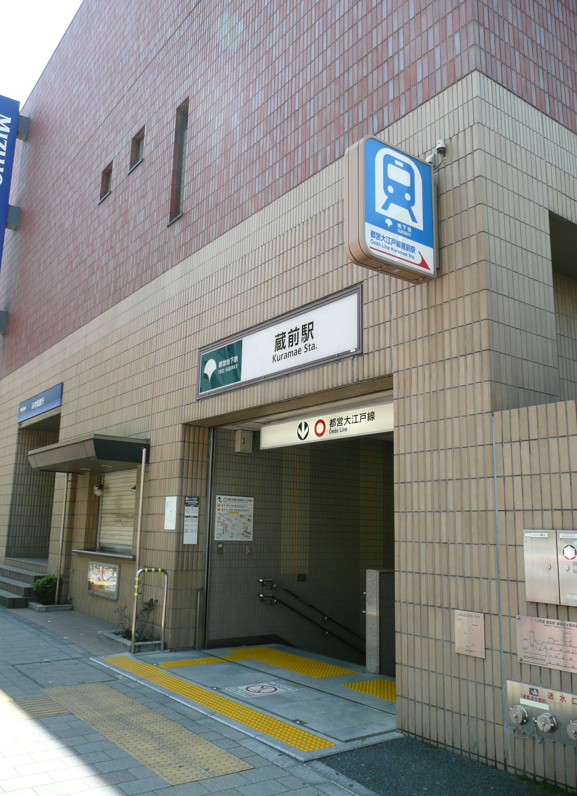 蔵前駅A6出入口